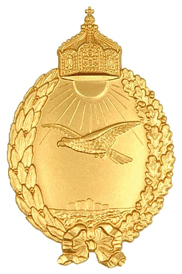 Marineflugzeugführerabzeichen von Seeflugzeugen